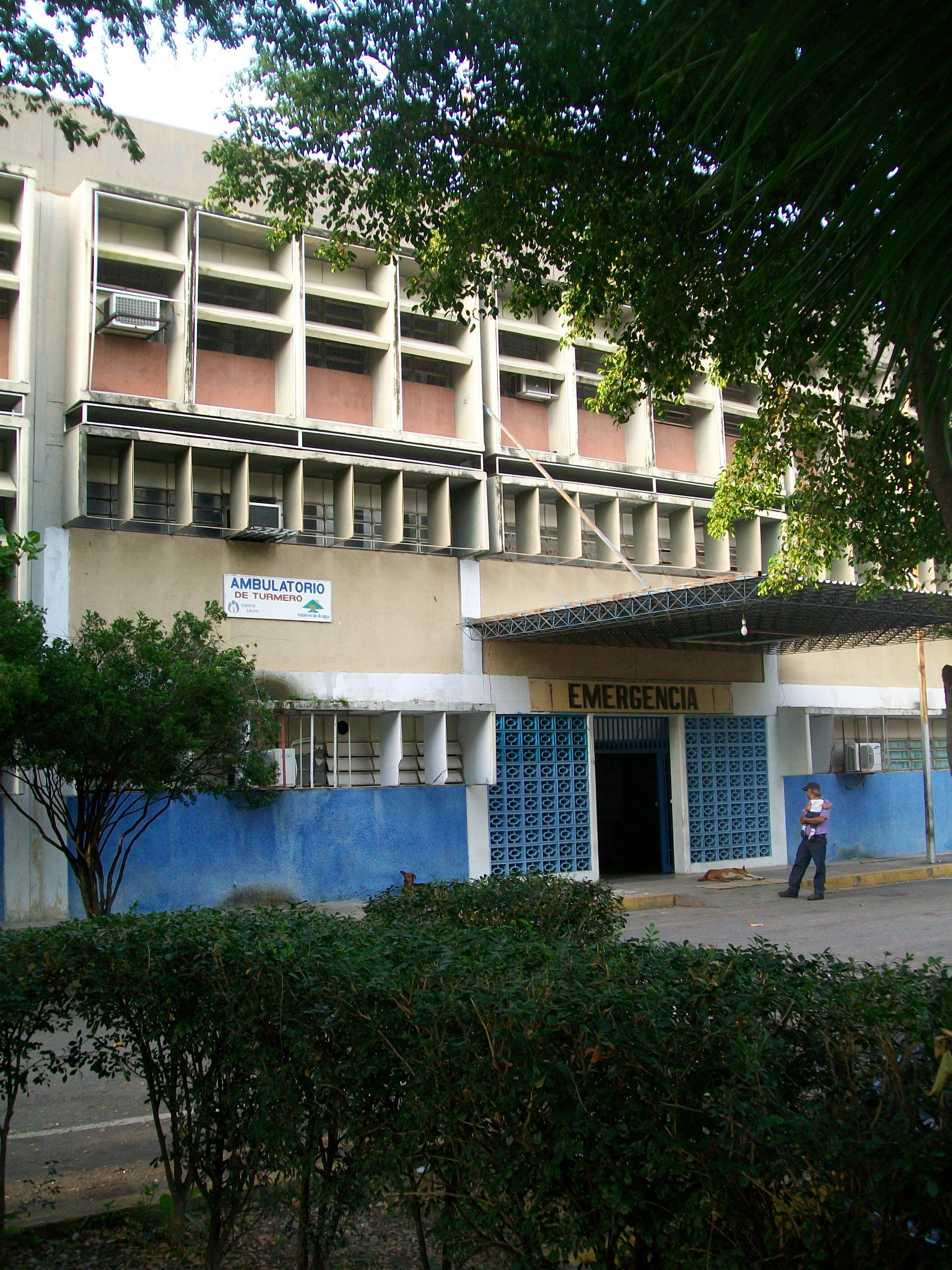 Ambulatorio urbano de Turmero, Venezuela.